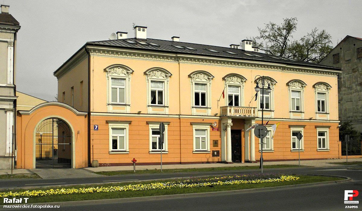 Dawna siedziba Loży Masońskiej.